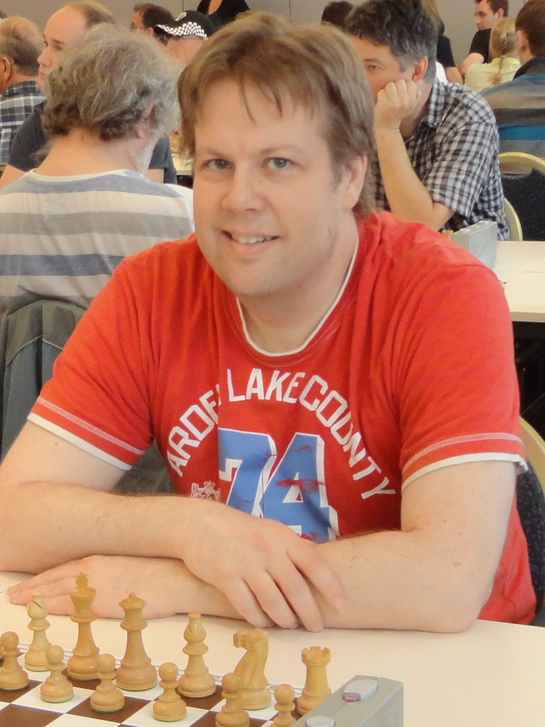 Björn Bente, Finale der Deutschen Pokalmeisterschaft im Schach 2016 in Halle an der Saale.